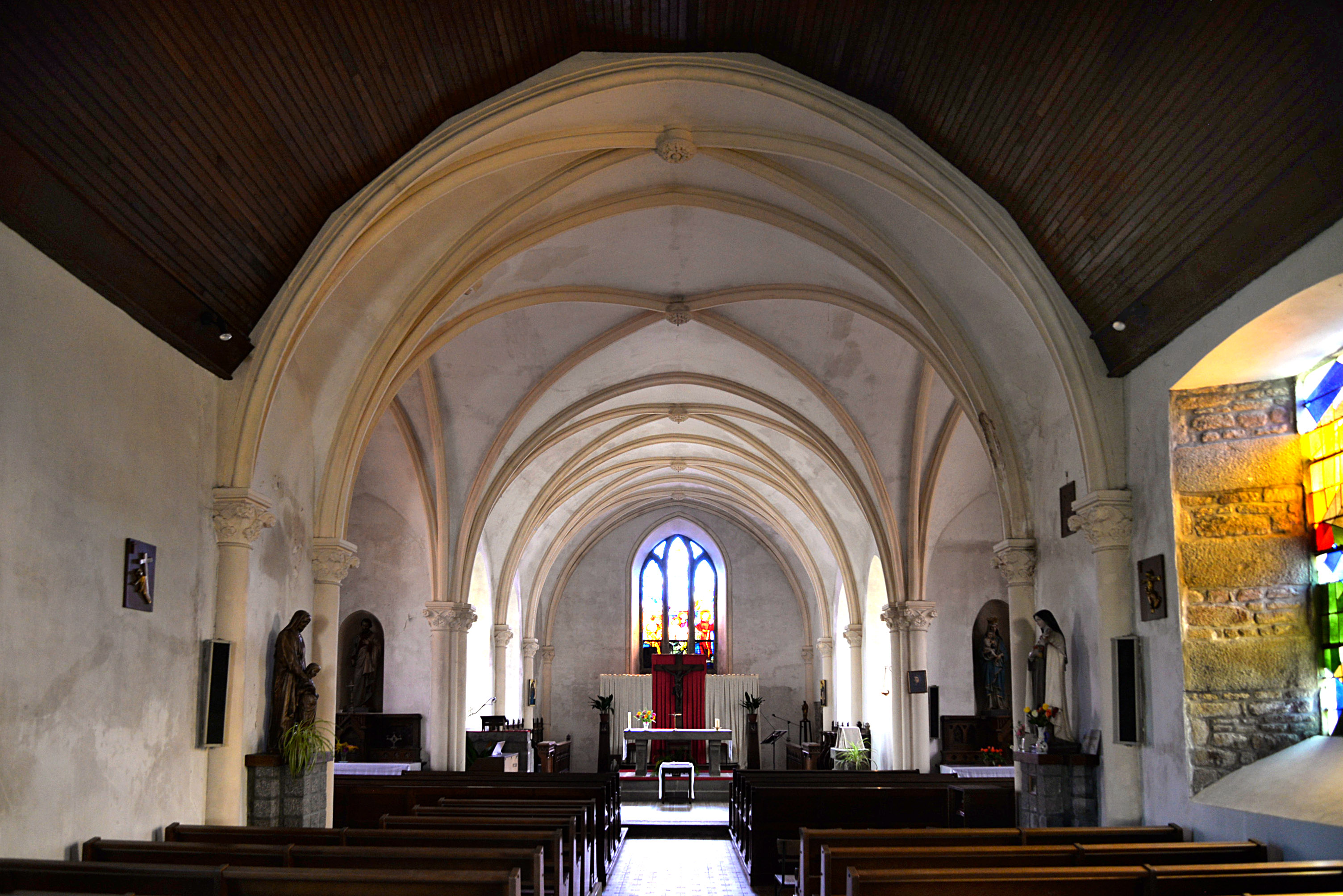 Chérencé-le-Héron (Manche)